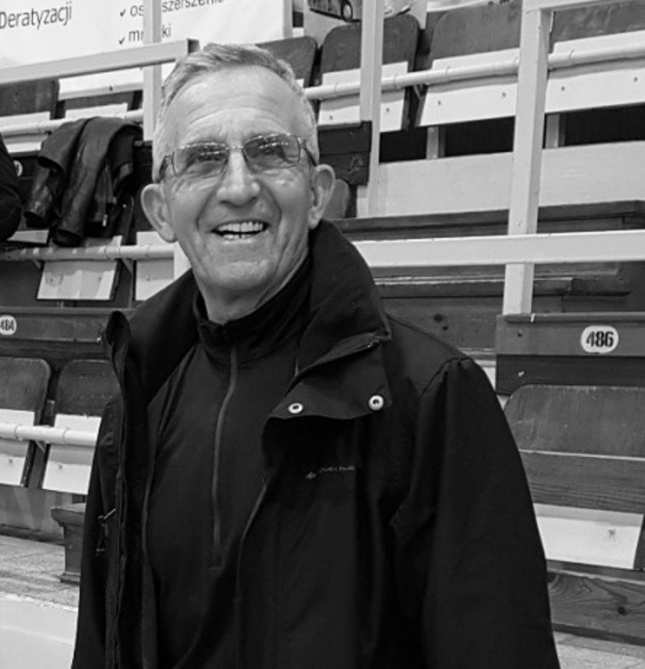 Ryszard Janik - trener Spójni Stargard w latach 1966 - 1990